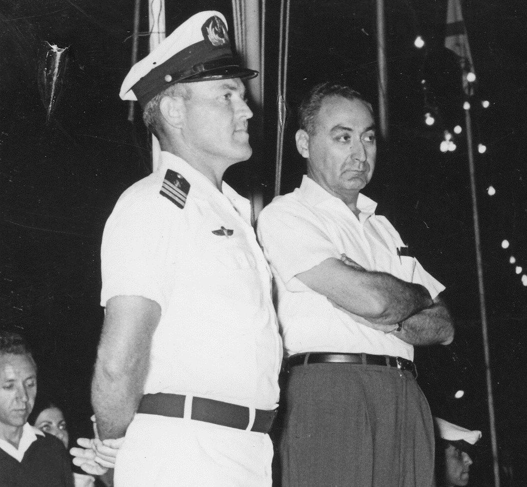 מפקד שייטת 13 אהרון בן יוסף עם אורח כבוד דגן שר הביטחון צבי דינשטיין בטקס